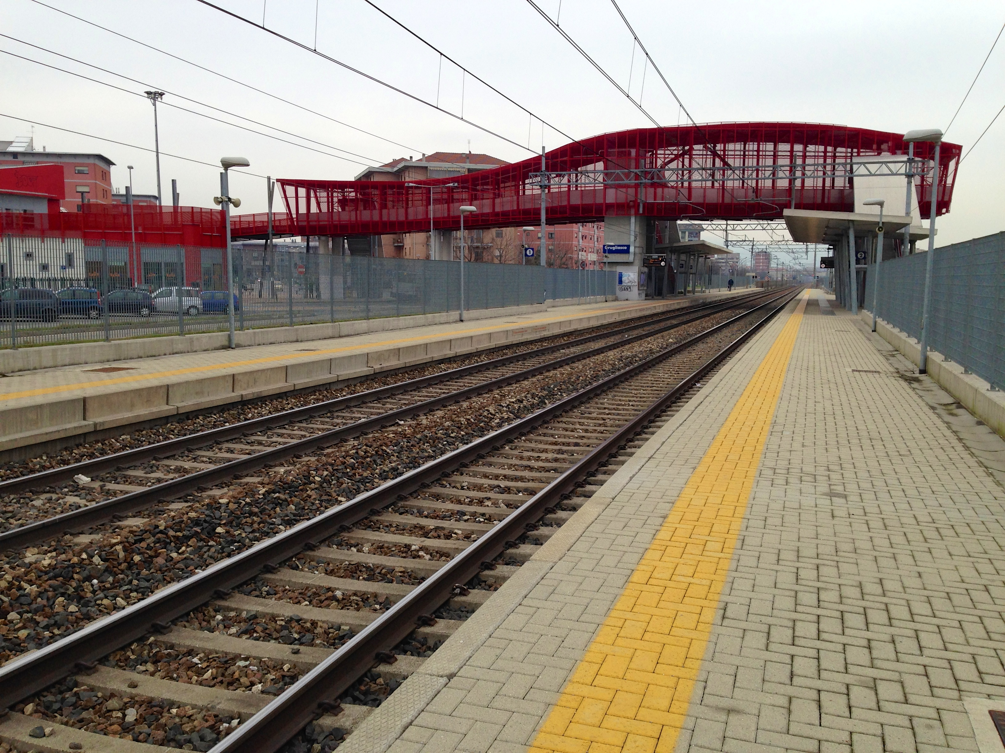 Stazione di Grugliasco